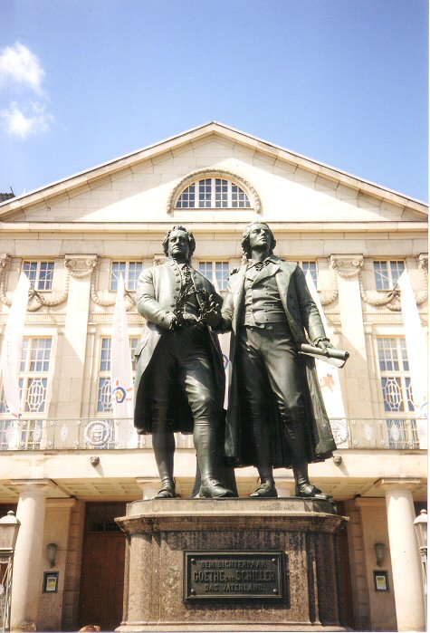 Goethe- en Schillermonument in Weimar. Eigen foto, juli 1996